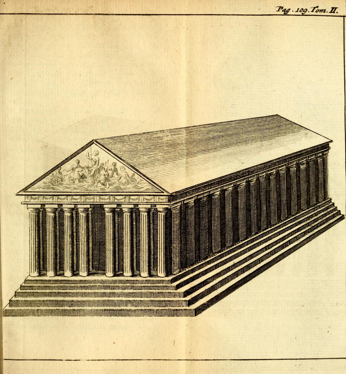 Partenone. Stampa tratta da: Voyage d'Italie, de Dalmatie, de Grece, et du Levant fait aux années 1675 & 1676 par Jacob Spon et George Wheler. Published 1679 by Chez Henry & Thedore Boom in Amsterdam.